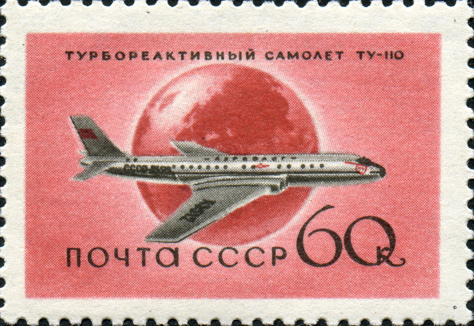 Марка СССР